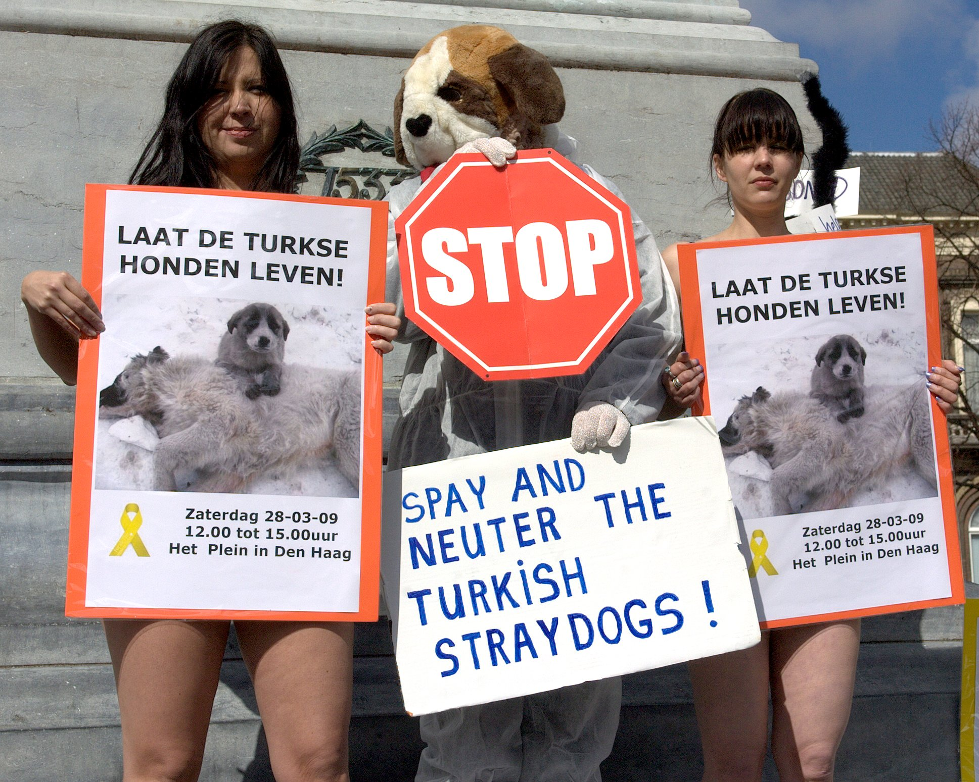 het Plein, Den Haag. Tijdens de 2e Wereldwijde demonstratie tegen het afslachten en mishandelen van zwerfhonden in Turkije, hebben Maria Arias en Ifygenia Kyrmos uit protest hun kleding uitgetrokken om de wereld te laten zien hoe koud het leven van zwerfhonden is.